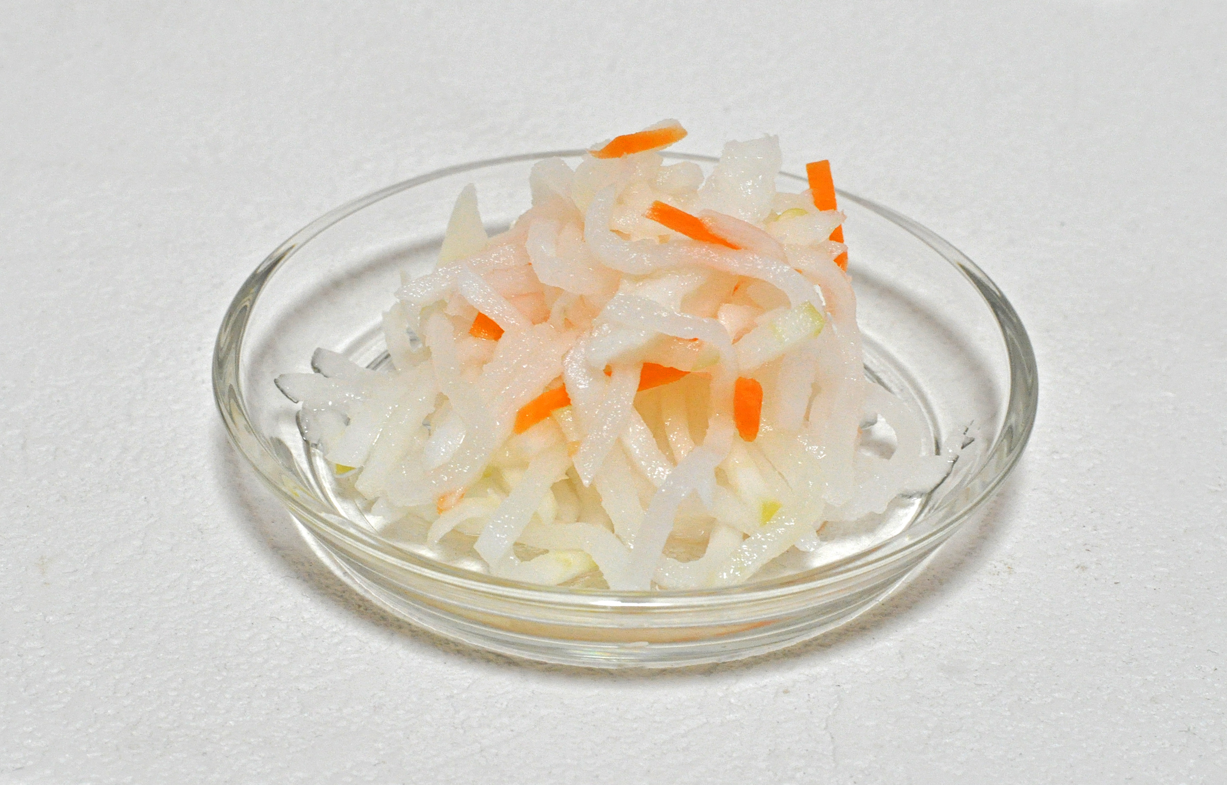 おせち料理の紅白膾